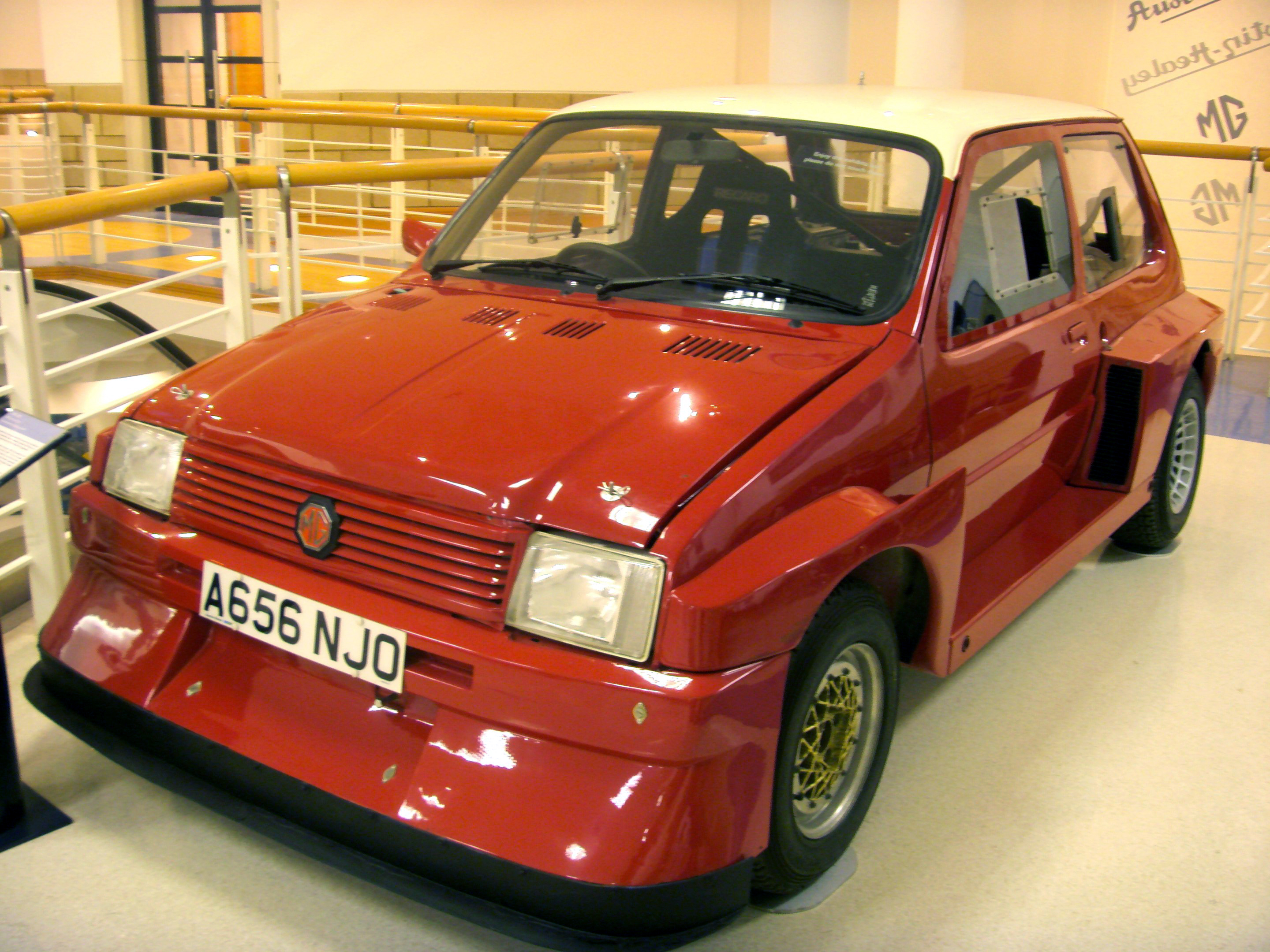 1983 MG Metro 6R4 Prototype